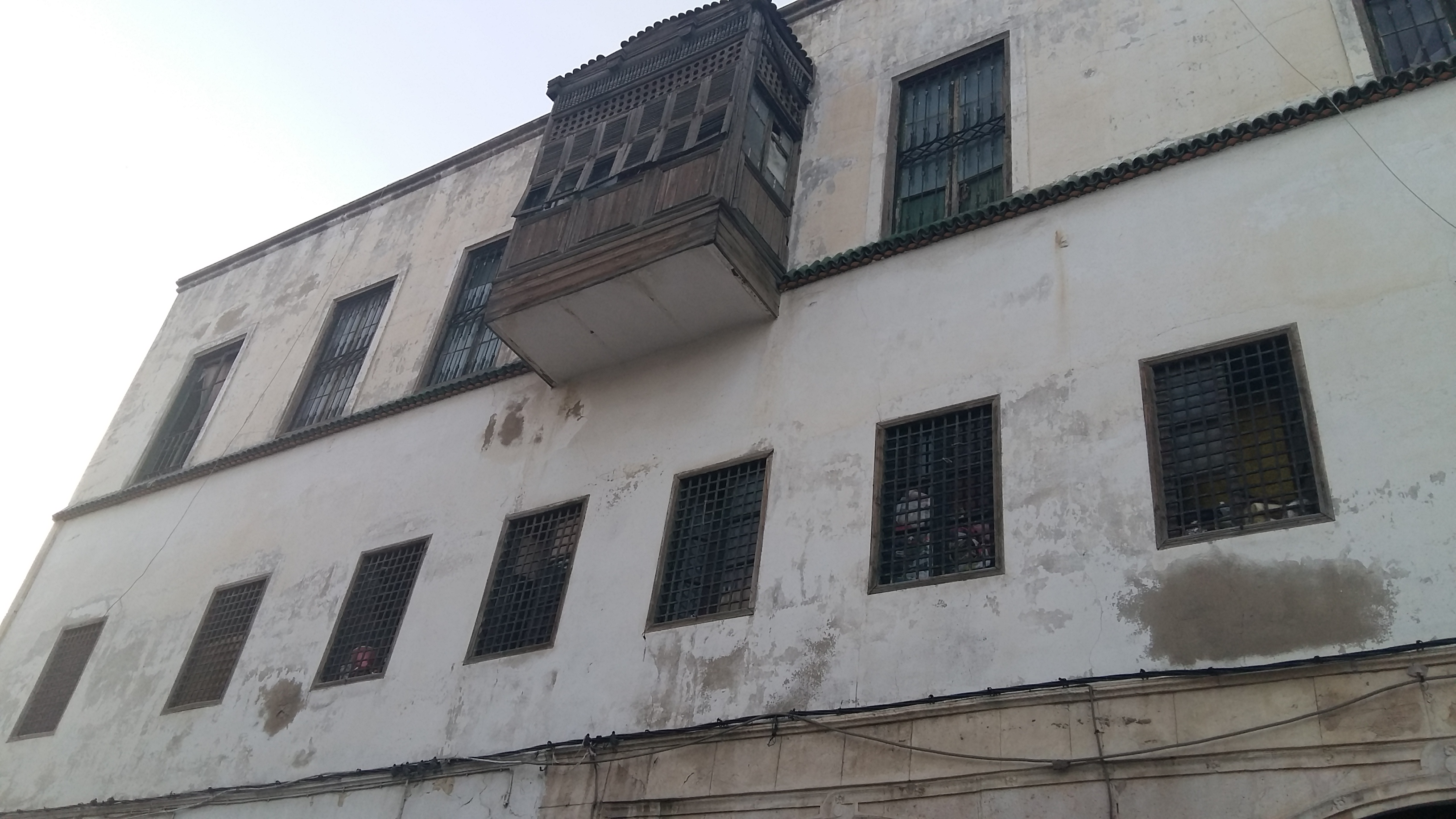 Palais Saheb Tabâa